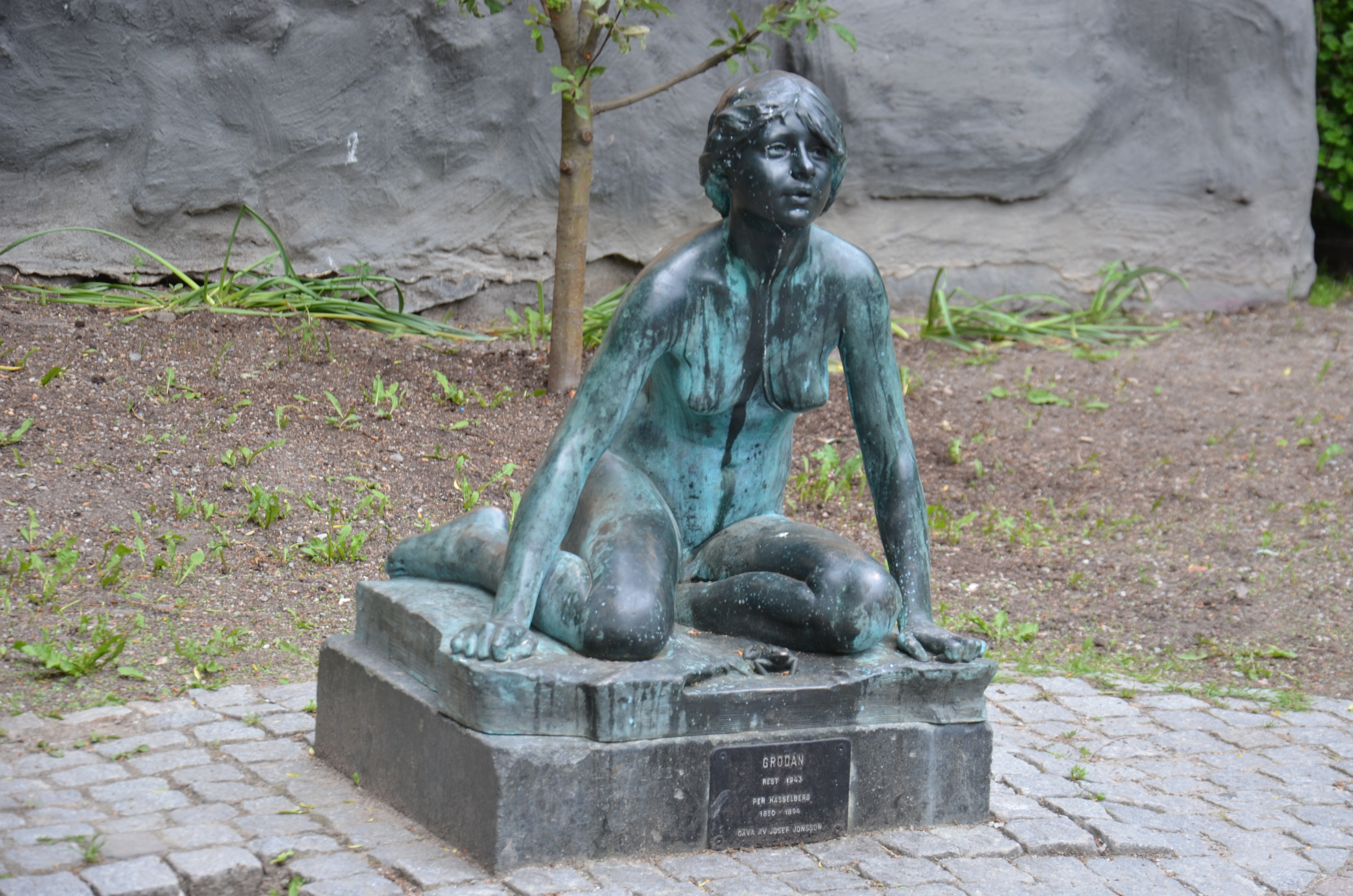 Per Hasselbergs Grodan, Björns Trädgård, Södermalm, Stockholm